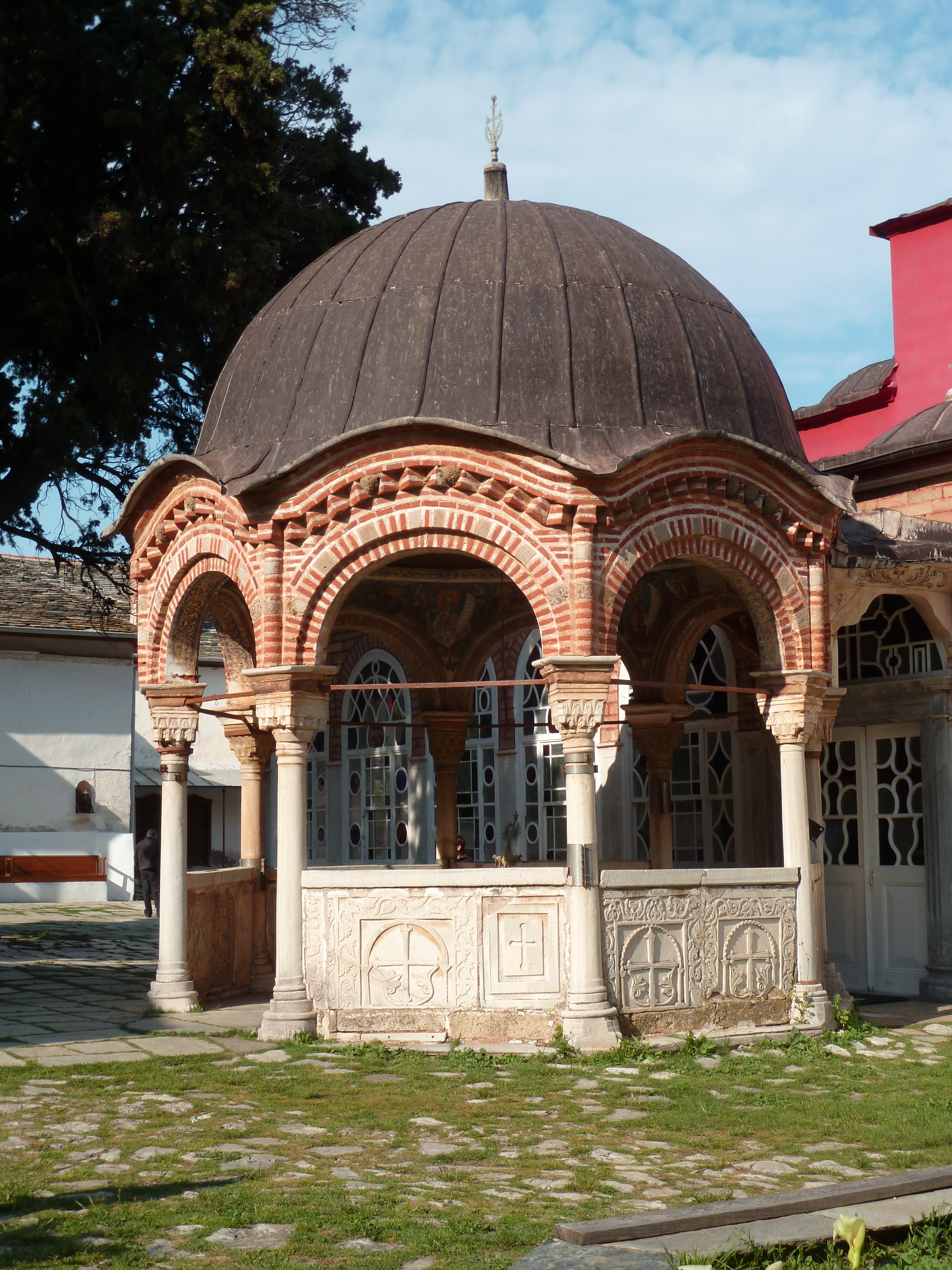 Phiale (fontaine rituelle) dans le monastère de la Grande Laure (Mont Athos)